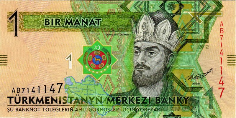 1 manat. Türkmenistan